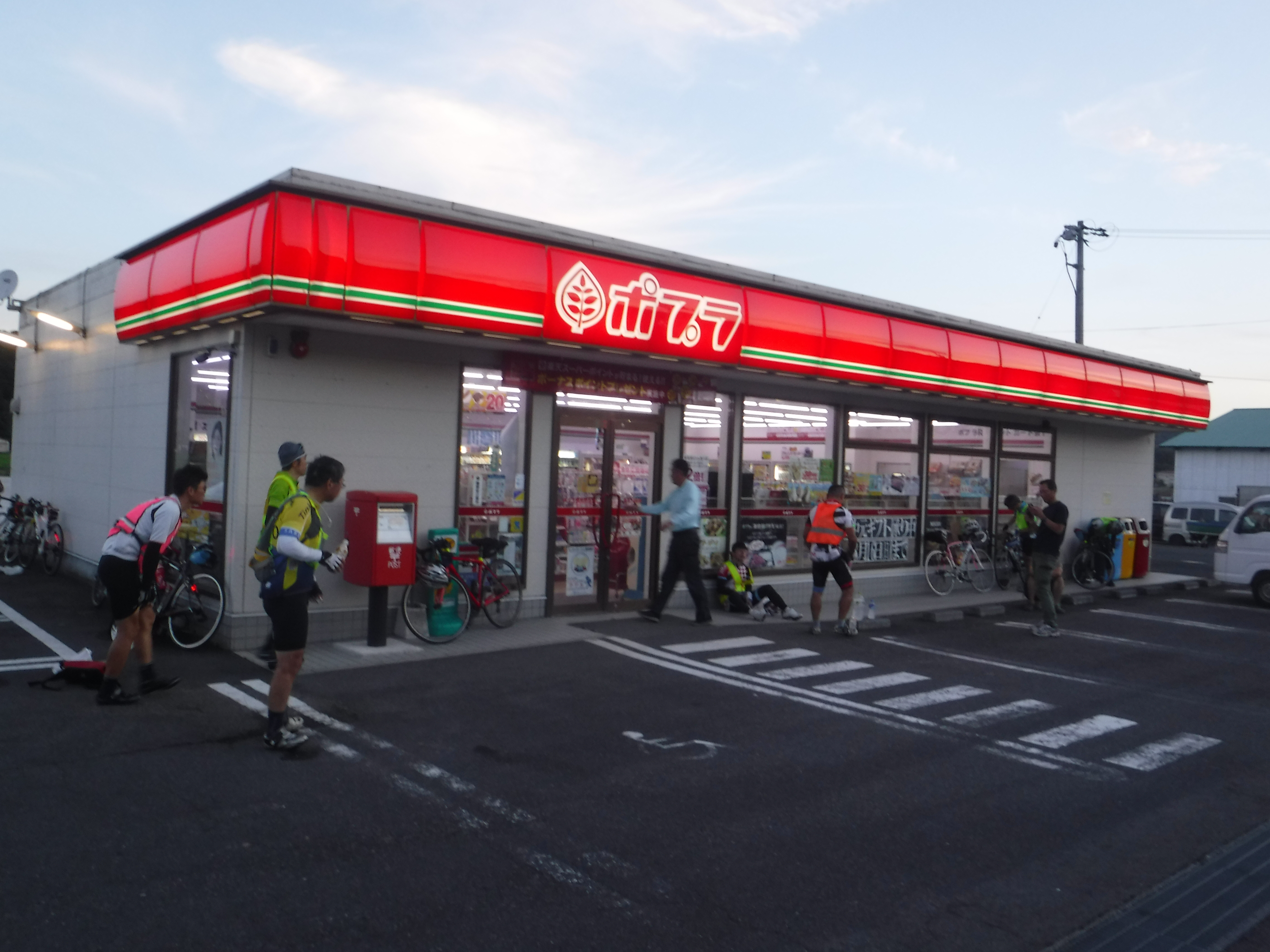 ポプラ飯南赤名店 ブルベのチェックポイント